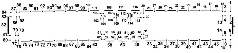 Plan numéroté de la galerie des batailles du château de Versailles reprenant la localisation des bustes et tableaux